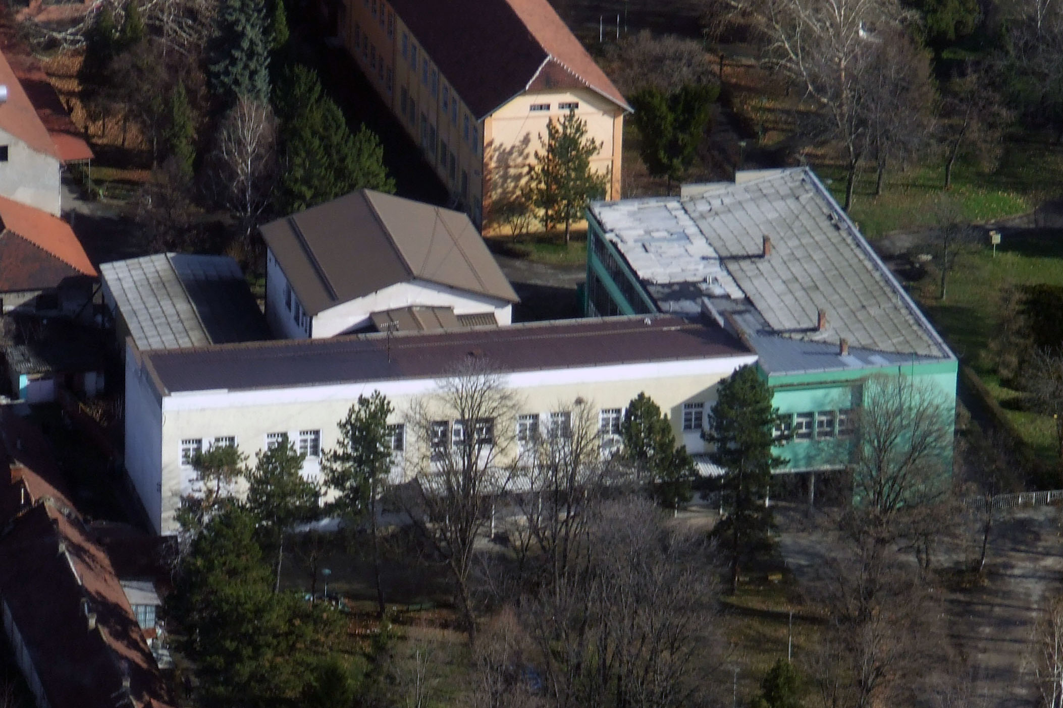 Висока технолошко уметничка струковна школа Лесковац 2010